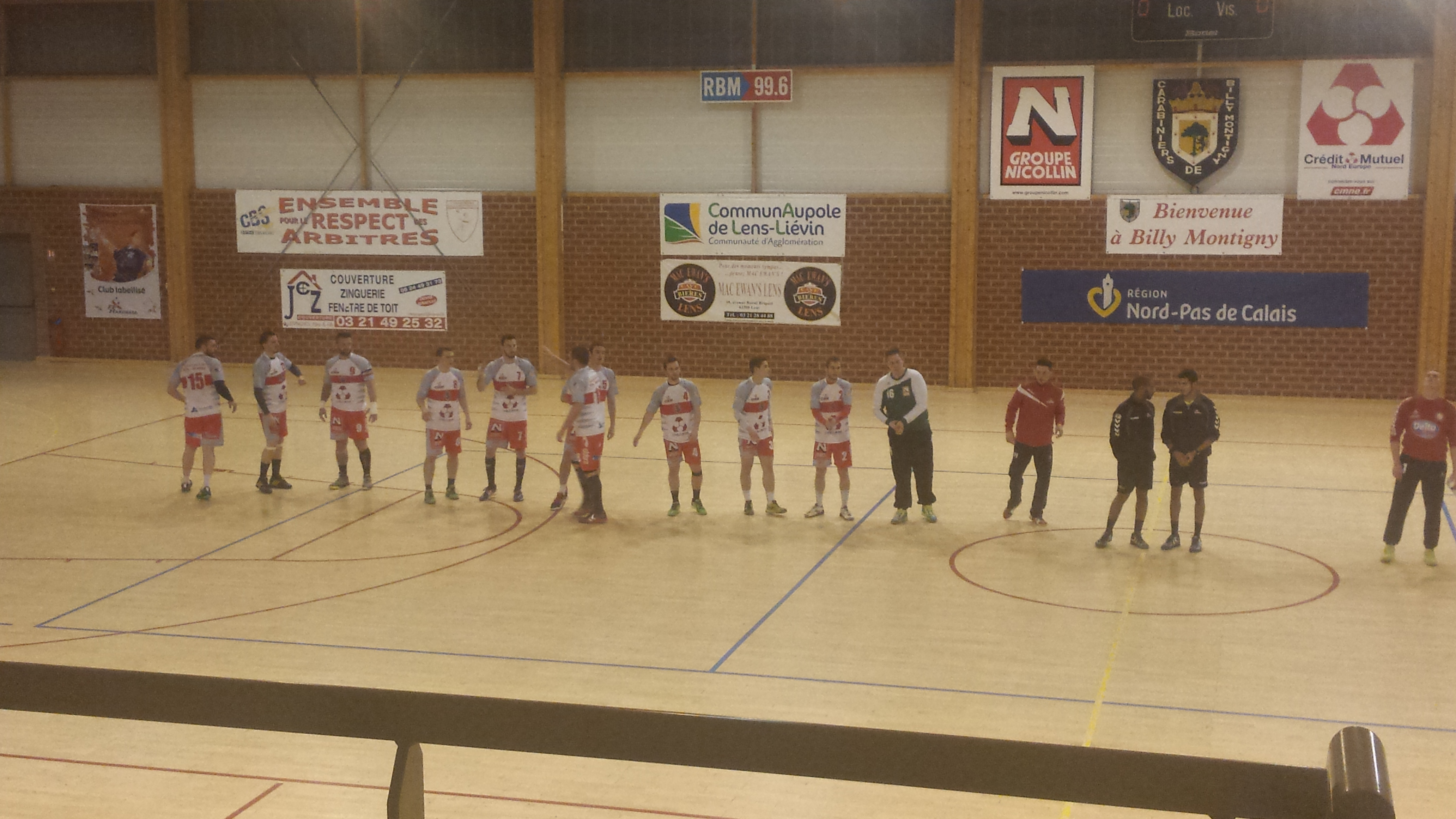 Joueurs des Carabiniers de Billy-Montigny avant la rencontre entre les Carabiniers de Billy-Montigny et le Gravelines USHB, comptant pour la treizième journée du championnat de France de handball de Nationale 2 Masculine, le 7 février 2015.